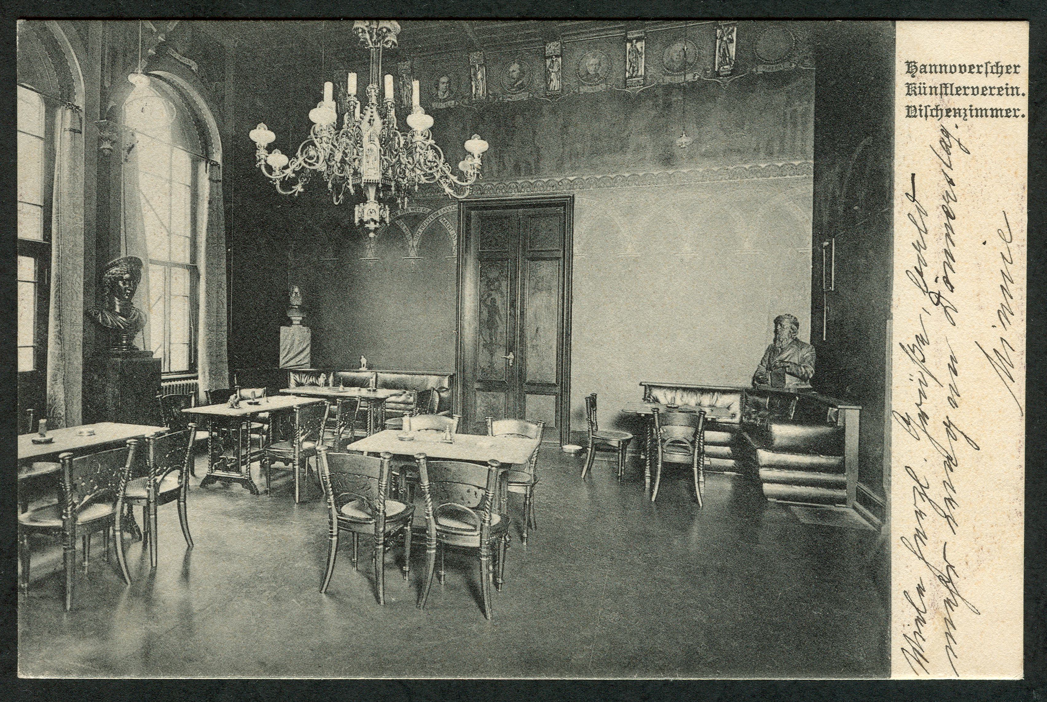 Bildmotiv der Ansichtspostkarte von Karl Friedrich Wunder